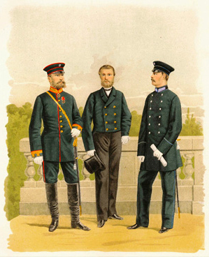 Гражданские Чиновники Военного ведомства. Артиллерийский чиновник штаб-офицерского звания в обыкновенной форме военного времени. Топограф обер-офицерского звания в сюртуке. Чиновник учебно-воспитательной службы военно-учебных заведений, не имеющий военного чина. ( приказ по военному ведомству 1883 г. № 83 )